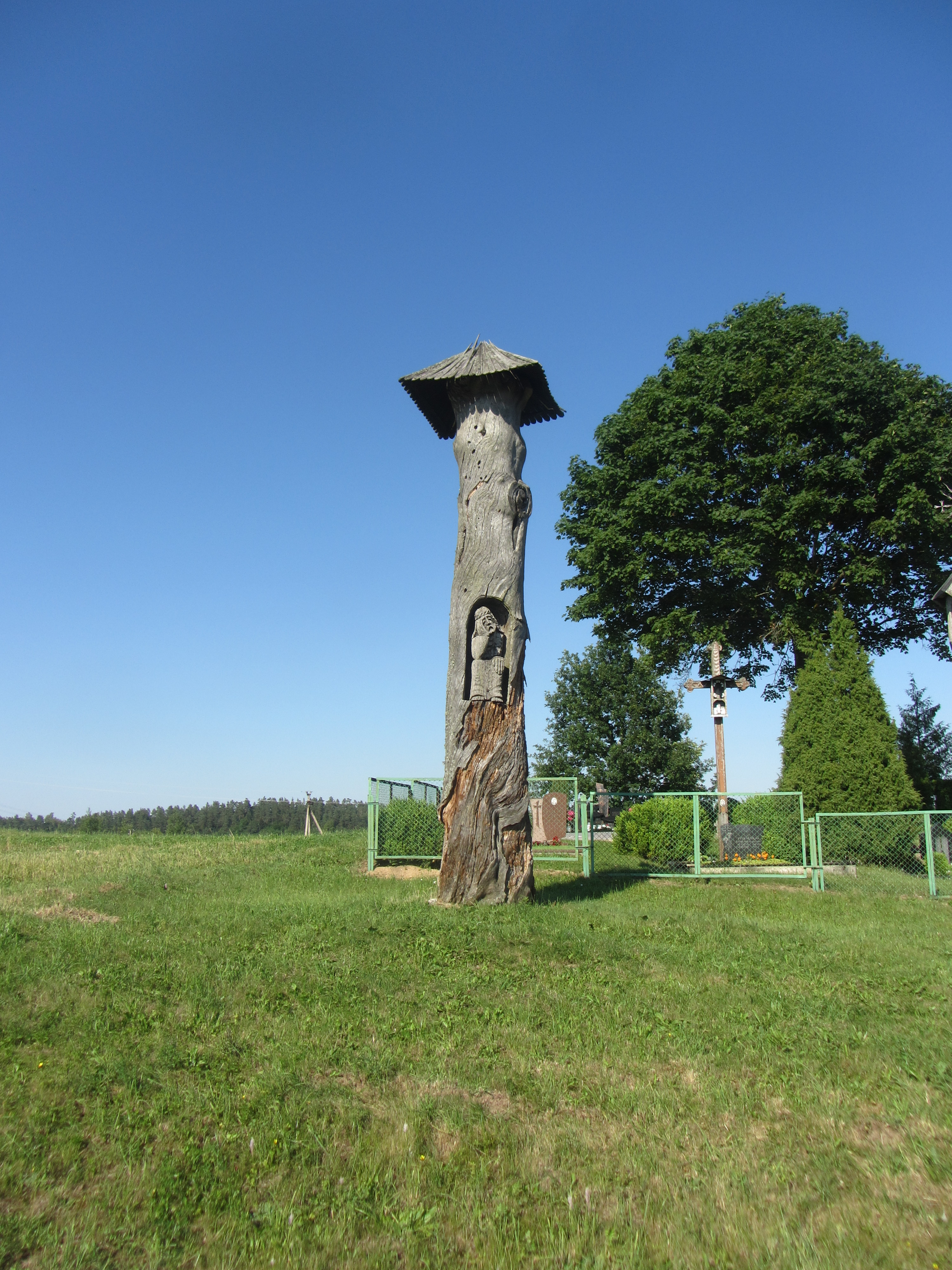 Raitininkų sen., Lithuania